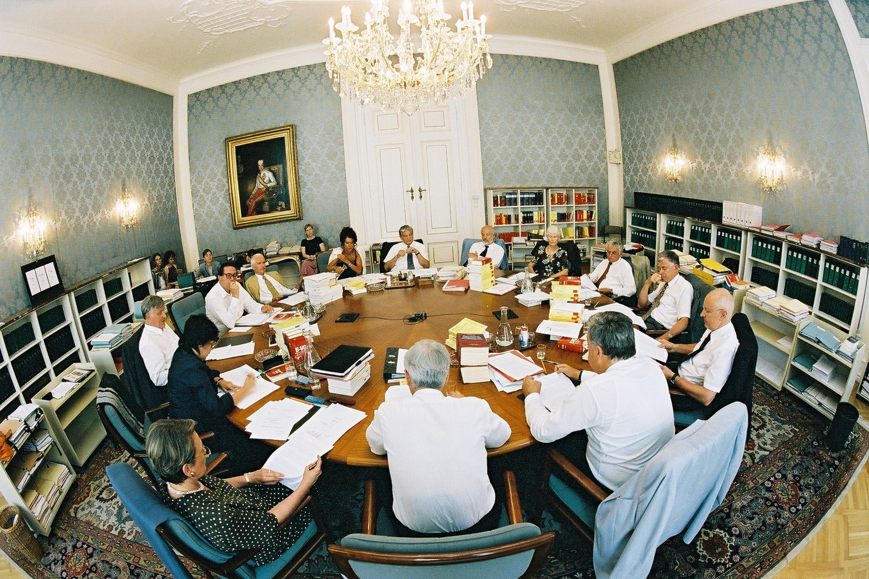 Der Blaue Salon des Verfassungsgerichtshofs in der Böhmischen Hofkanzlei diente bis zum Umzug des Gerichtshofs im Jahr 2012 als Beratungszimmer der Verfassungsrichter. Hier eine Aufnahme aus der Sommer-Session des VfGH im Juni 2003 unter Anwesenheit aller Mitglieder des Verfassungsgerichtshofs.